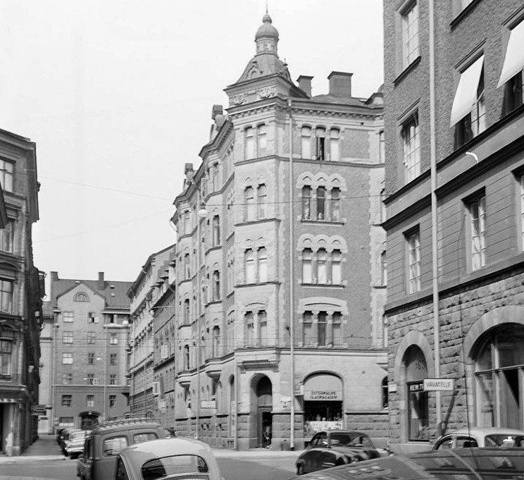 Tyskbagargatan västerut mot Sibyllegatan